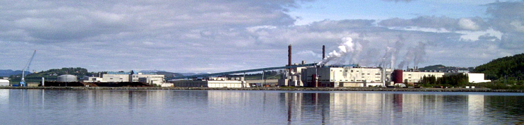 Norske Skogindustriers papirfabrikk på Fiborgtangen, Levanger.